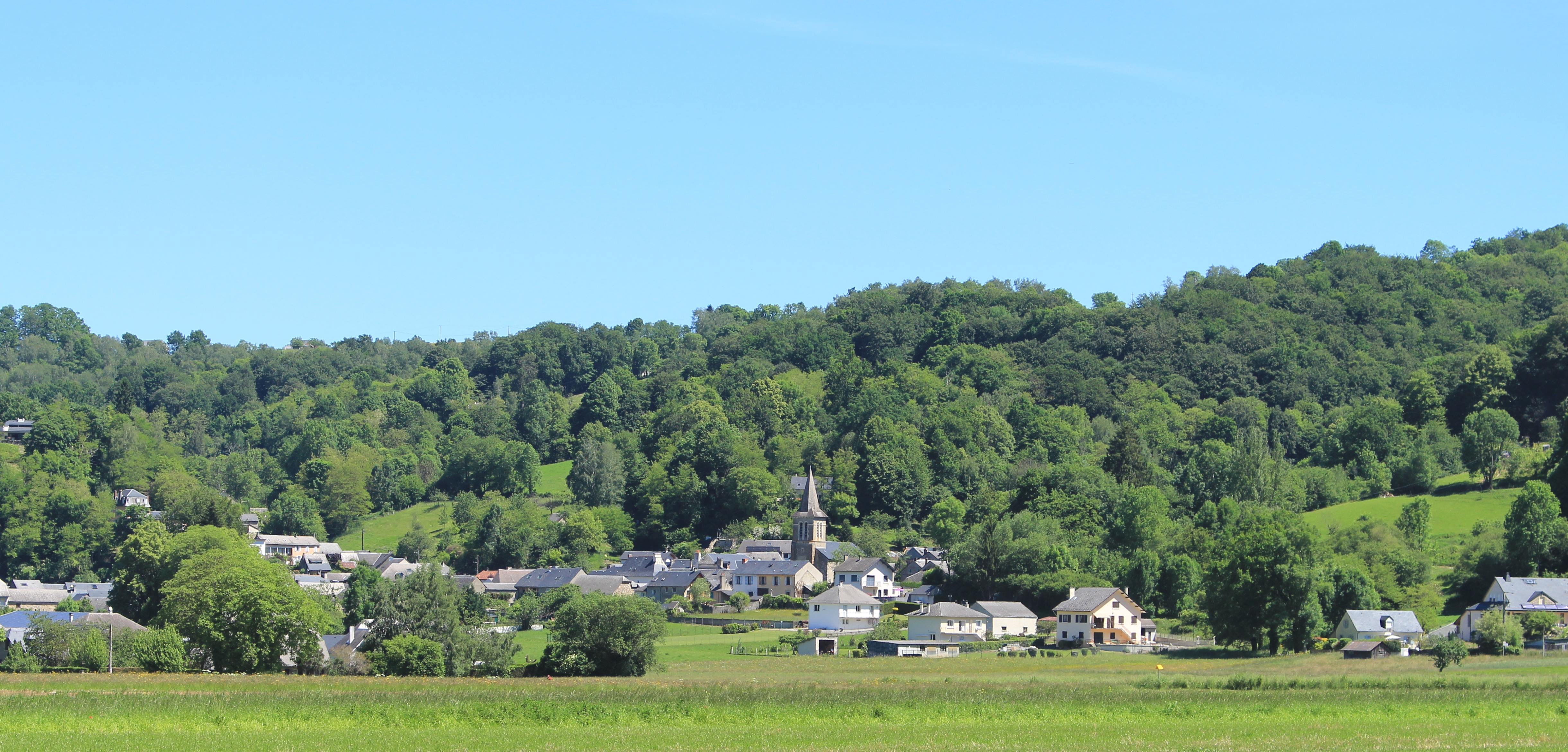 Gerde (Hautes-Pyrénées)